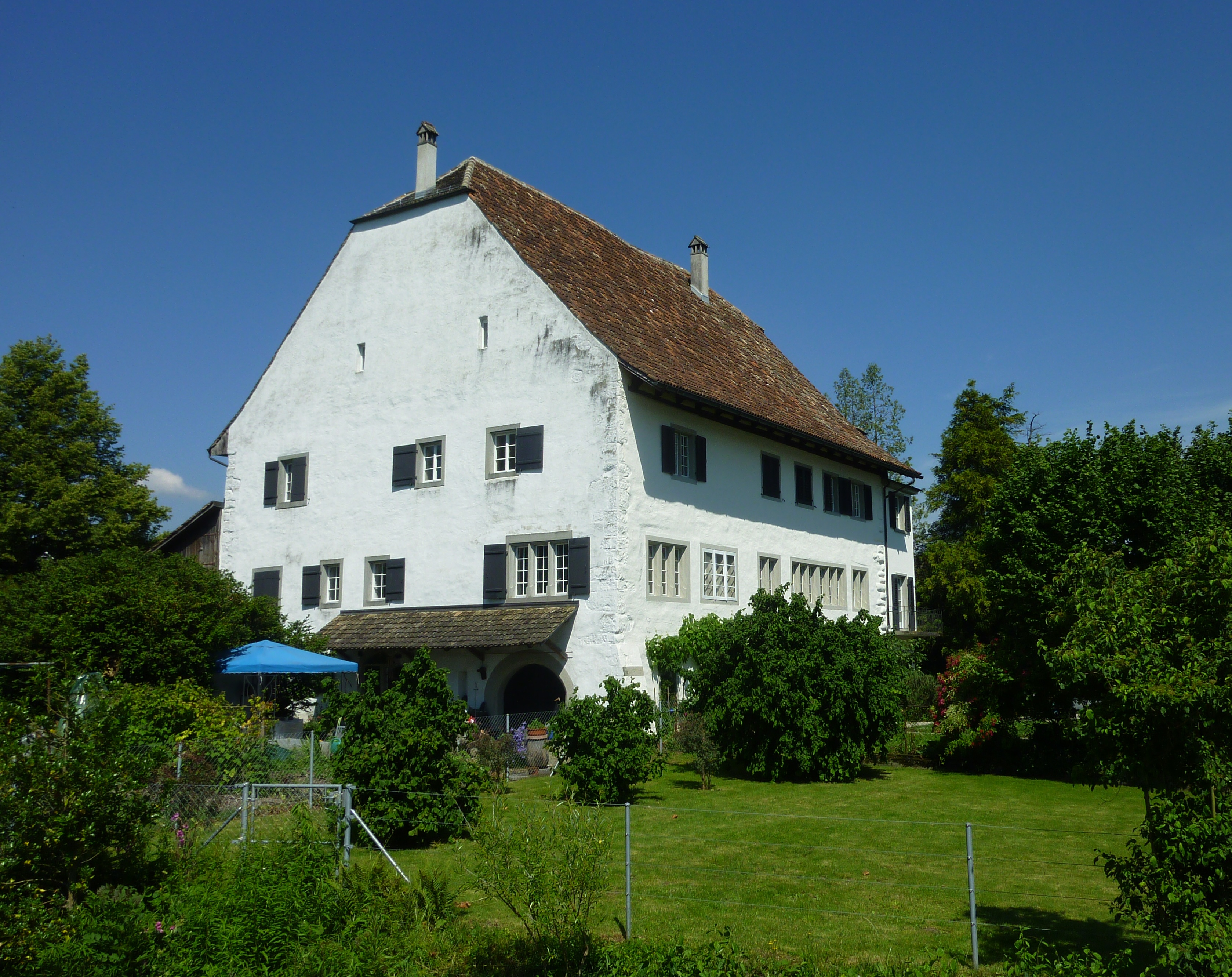 Ritterhäuser Uerikon: Burgstall